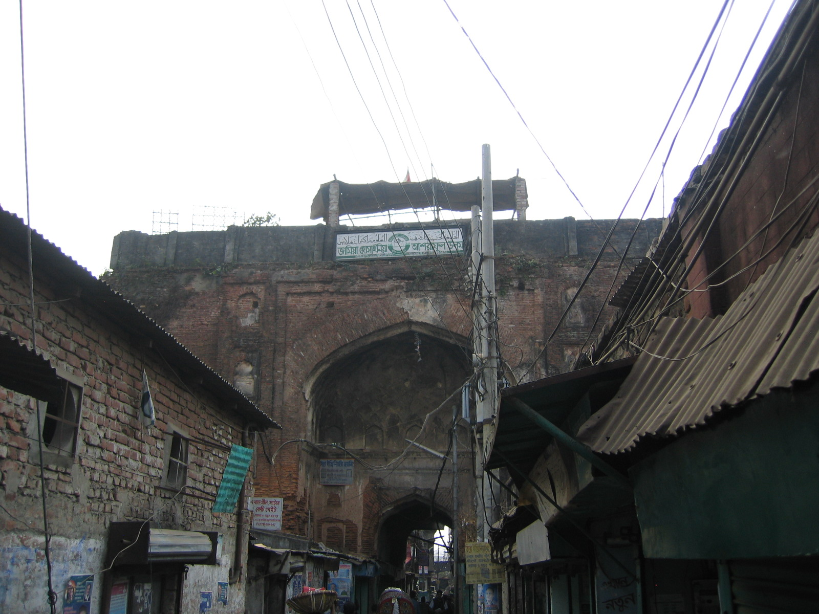 Bara Katra ruins of old Dhaka, Bangladesh